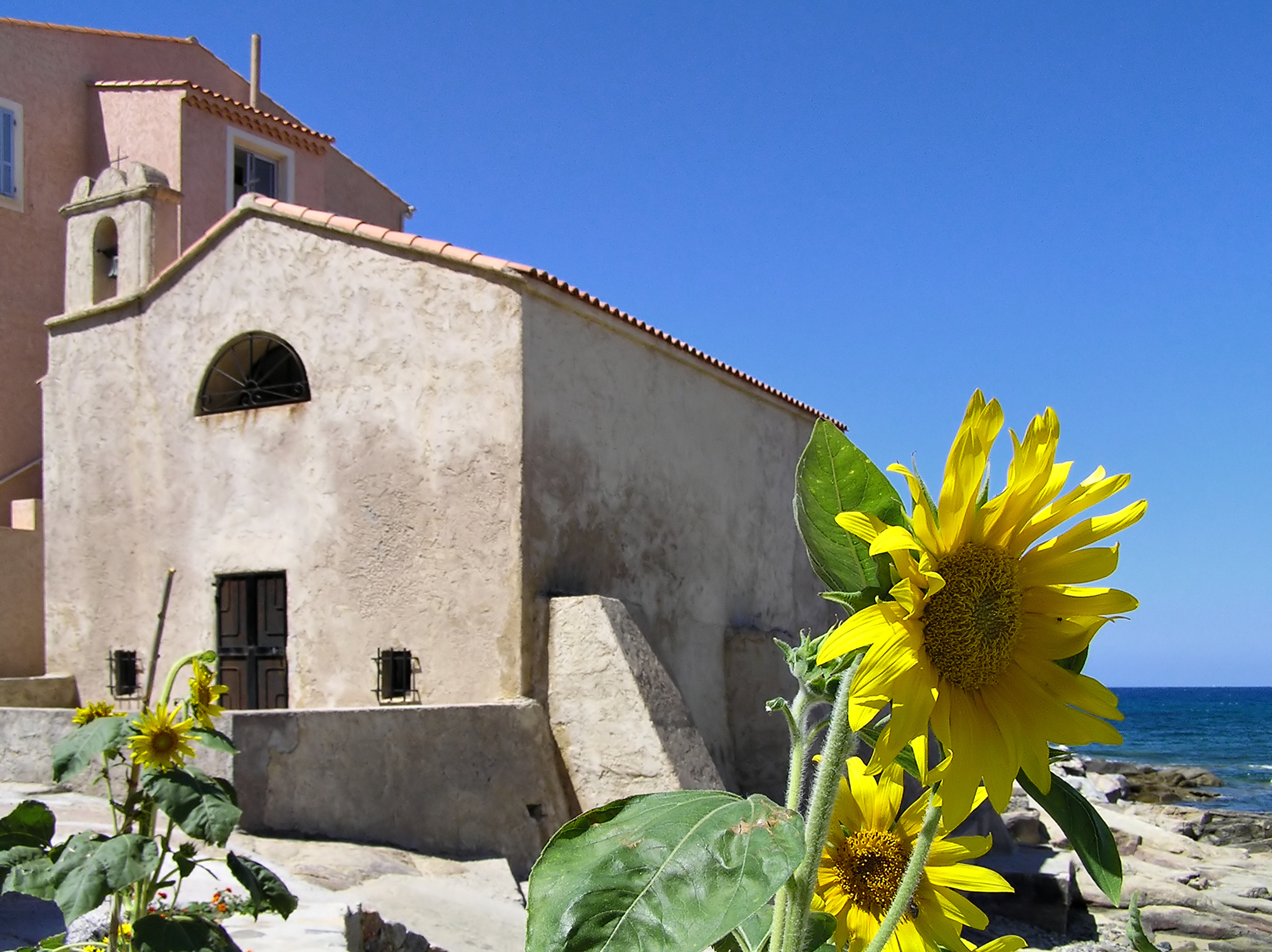 Algajola - Chapelle Saint-Michel